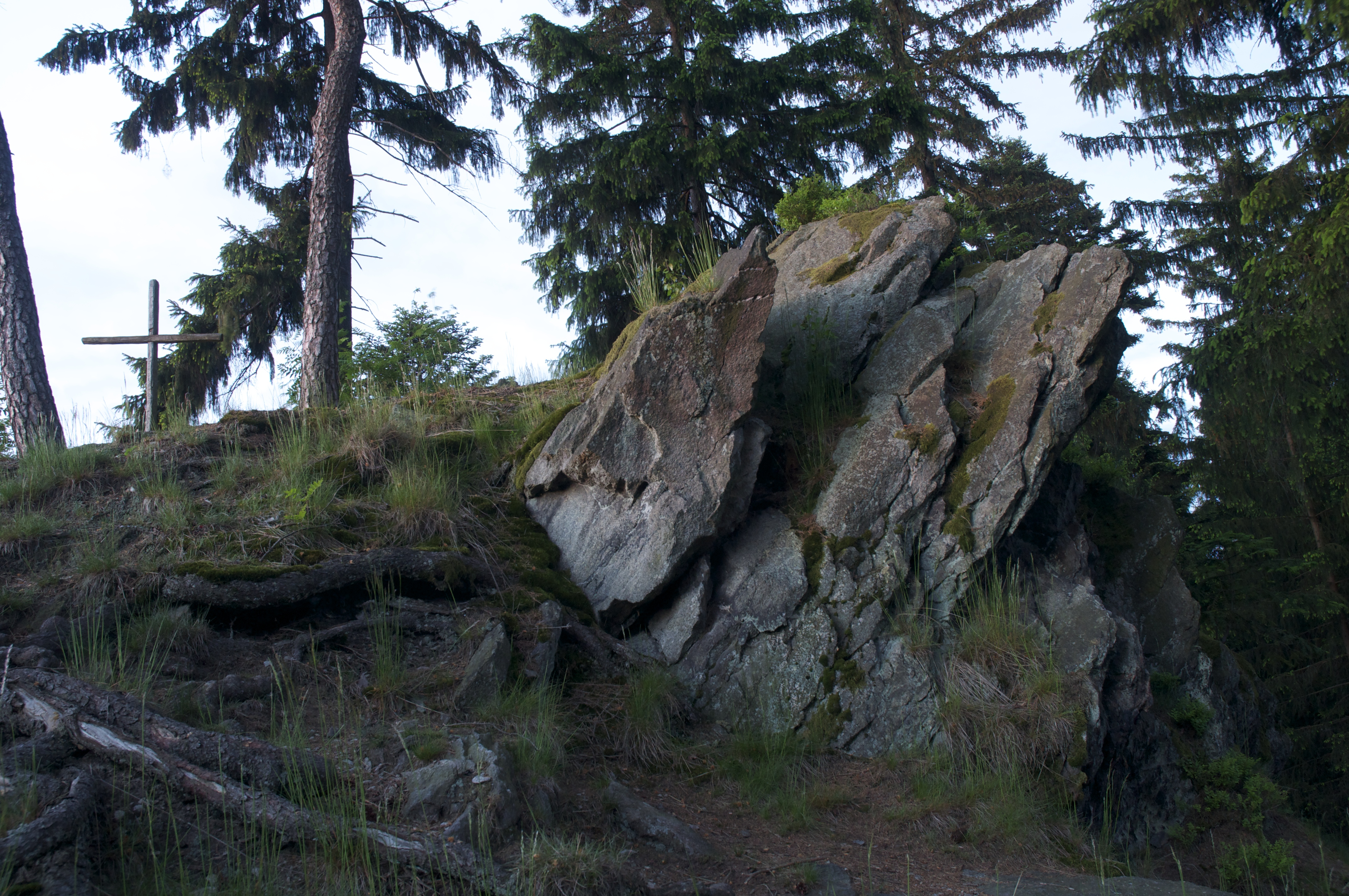 Naturdenkmal Bayern/Oberfranken